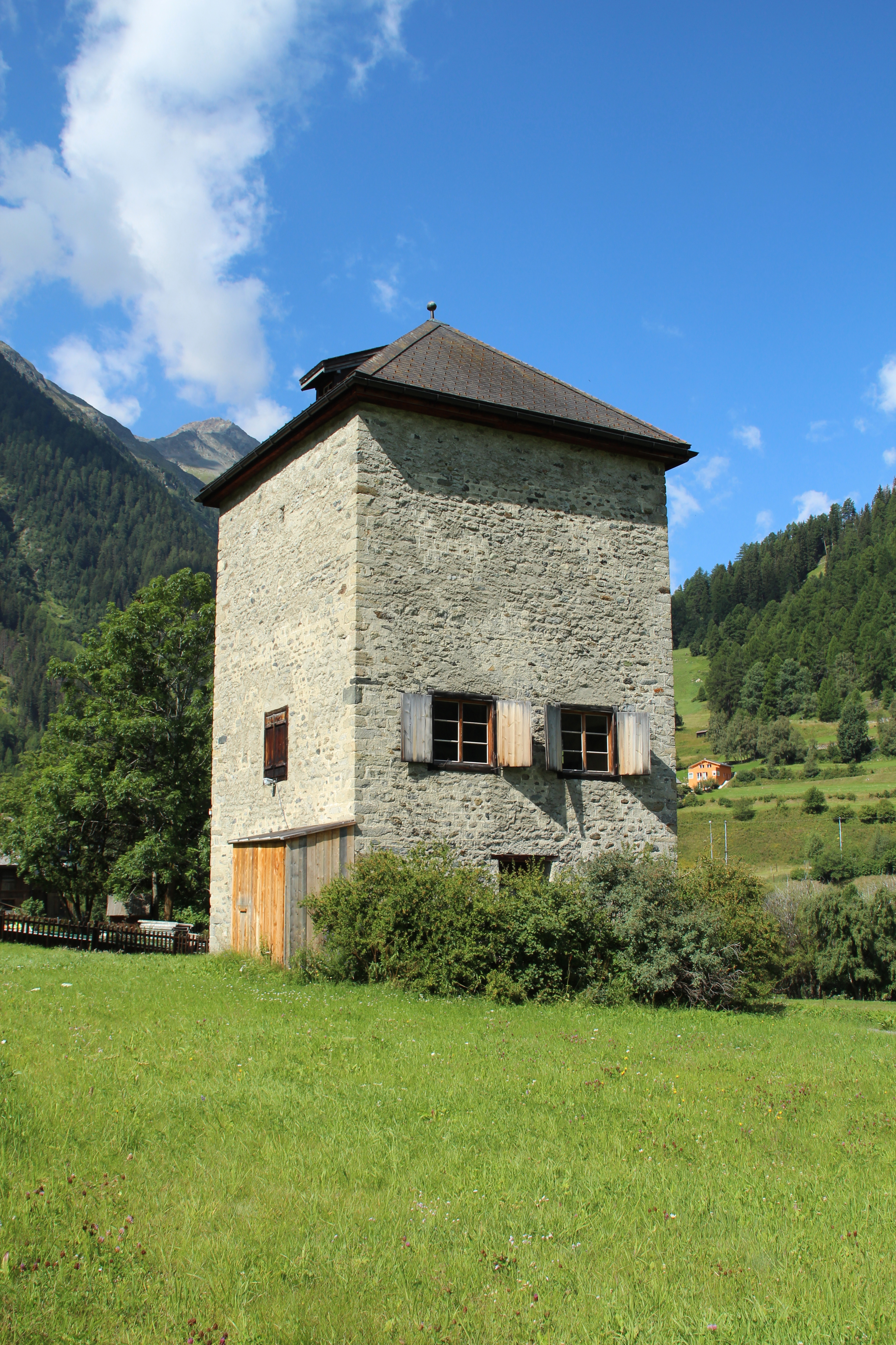 Turm La Praschun Nordseite